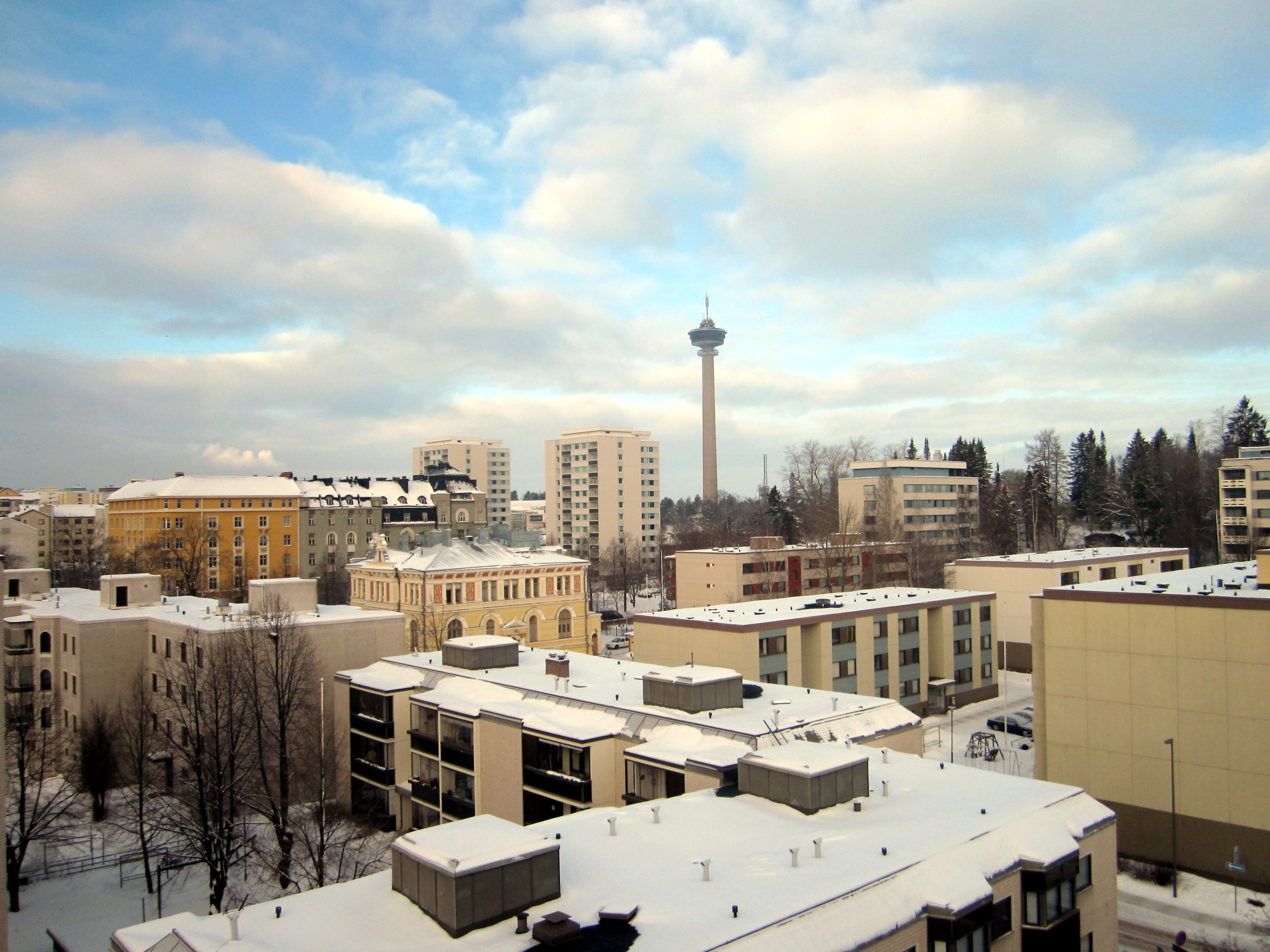 Näsinneula Tampereen kaupunkikuvassa talvella 2013.